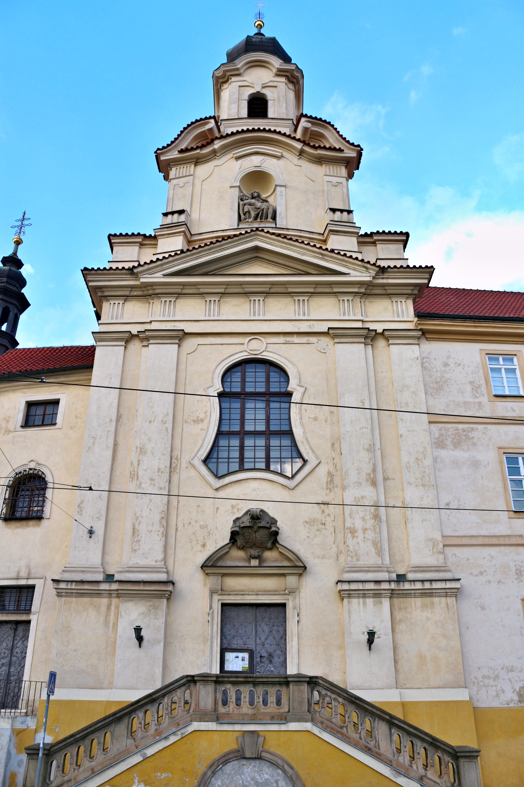 Kostel Panny Marie Sedmibolestné u alžbětinek